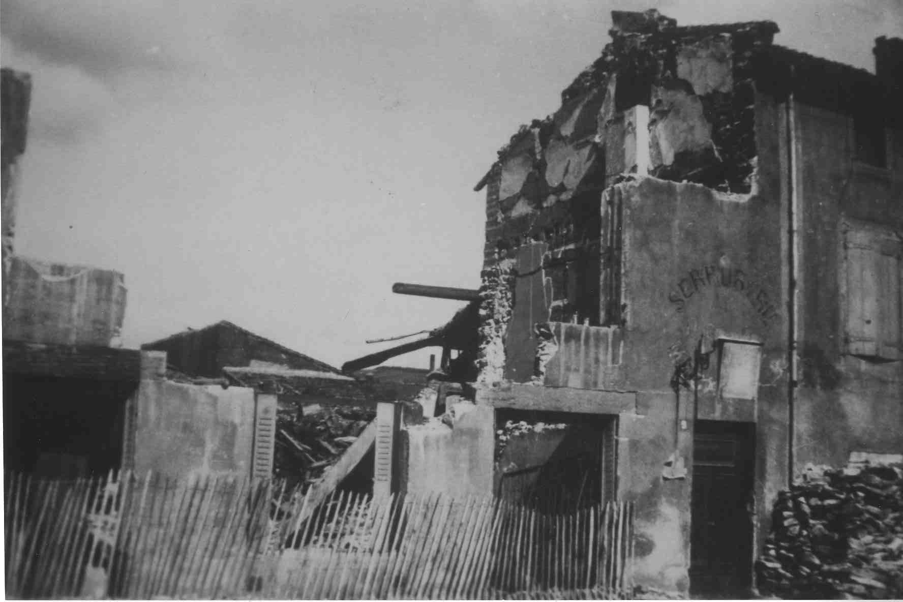 Bombardement du 1er juin 1940, Givors, quartier de Canal. Archives municipales de Givors, cote 5Fi 260